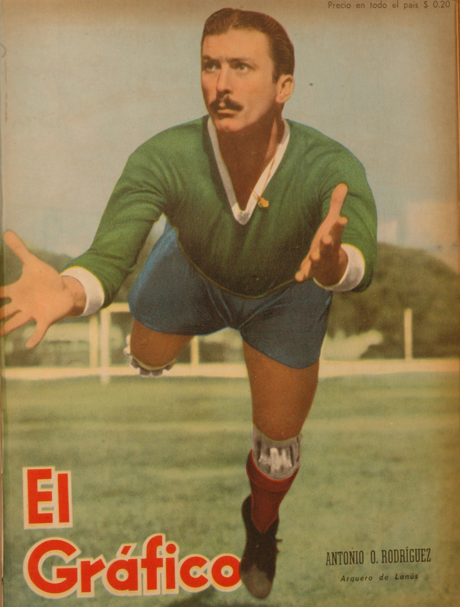 El Grafico del 04 de Mayo de 1945. Edicion 1347